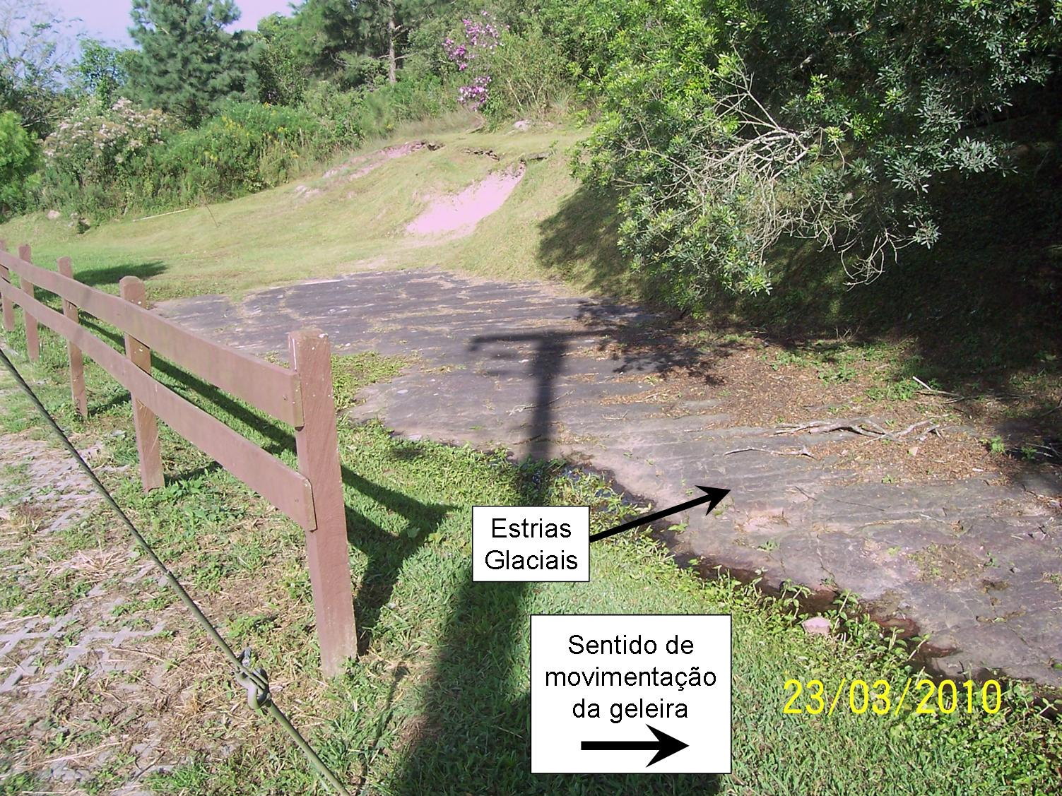 Sítio Geológico Estrias Glaciais de Witmarsum, Palmeira, Paraná, Brasil. Este afloramento é um registro marcante da grande glaciação que ocorreu do Carbonífero inferior ao Permiano inferior, entre 360 e 270 milhões de anos, quando toda porção sul do antigo supercontinente Gondwana ficou coberto por espessas camadas de gelo.